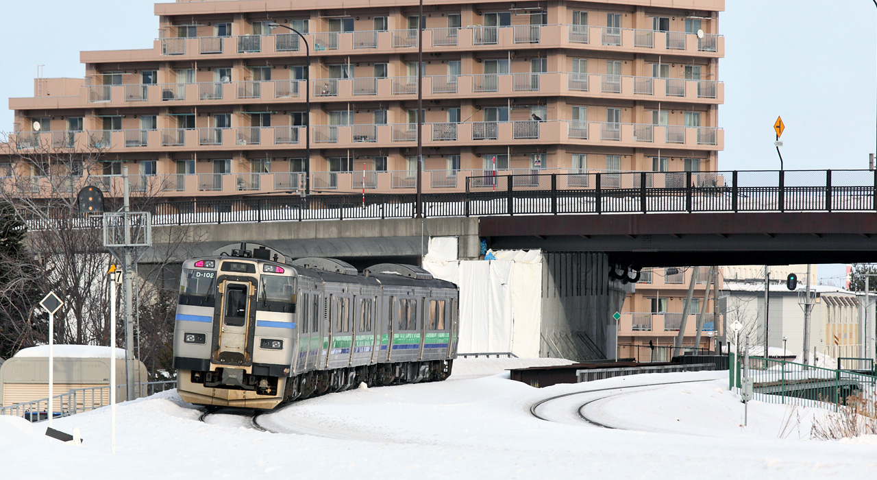 JR Hokkaido Kiha 201 series DMU ( Shin-kotoni Stn. - Taihei Stn. )